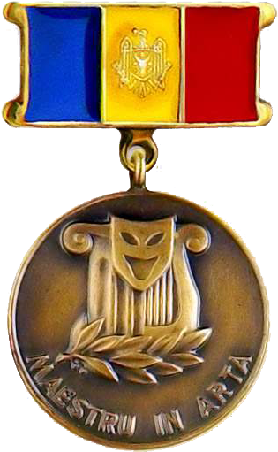 Нагрудный знак к почётному званию "Maestru in arta" (Молдавия)